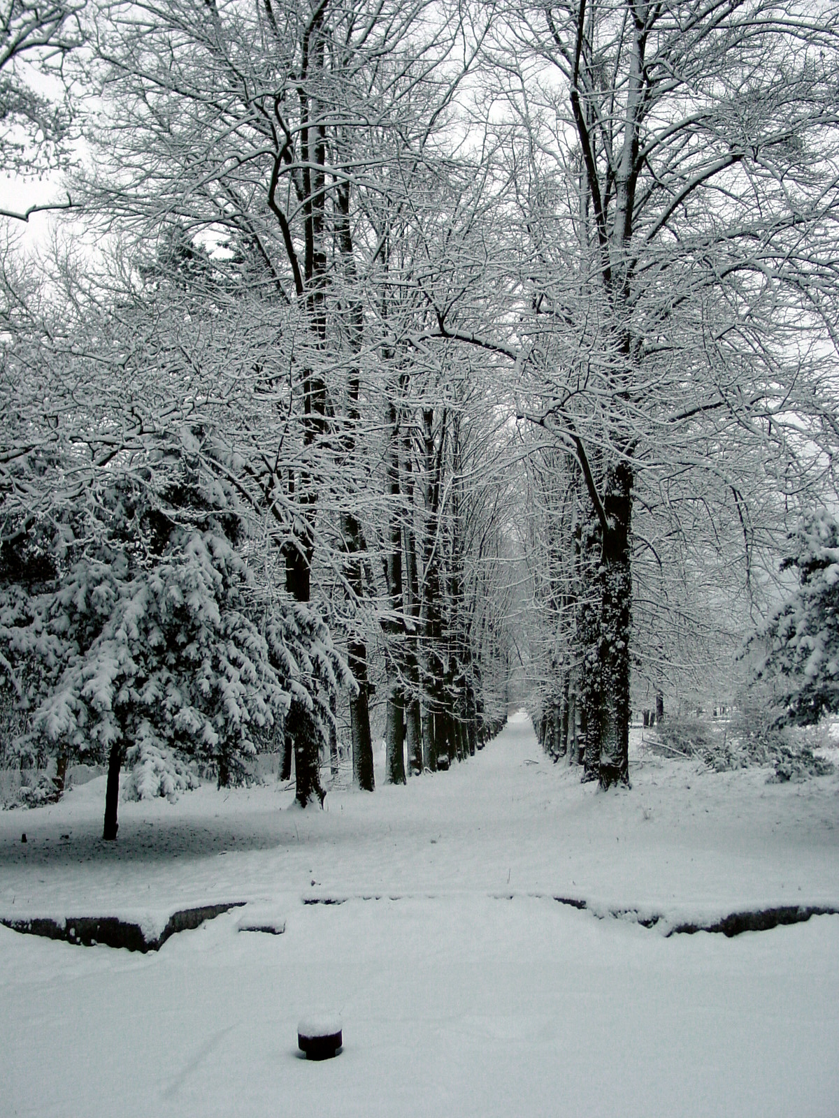 Sicht in die Kastanienallee im Park Hirschfelde. Im Vordergrund sichtbar, begraben unter Schnee, sieht man die Reste des alten Springbrunnen, eines alten Ausgrabungsstückes aus Herkulaneum am Vesuv. Es existiert nur noch das Becken, das Marmorgeländer ist nicht mehr vorhanden.